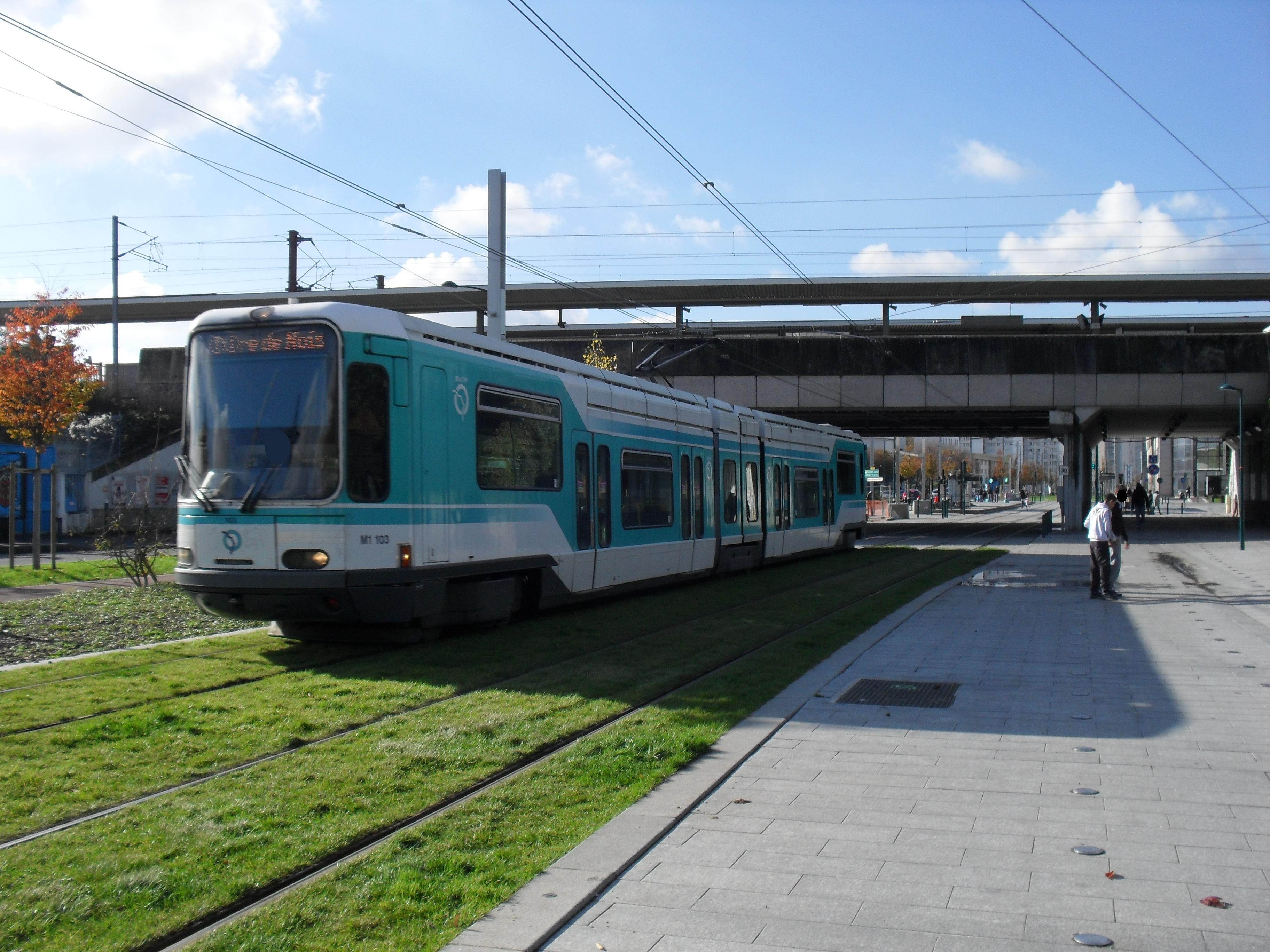 Paris Tramway ligne 1